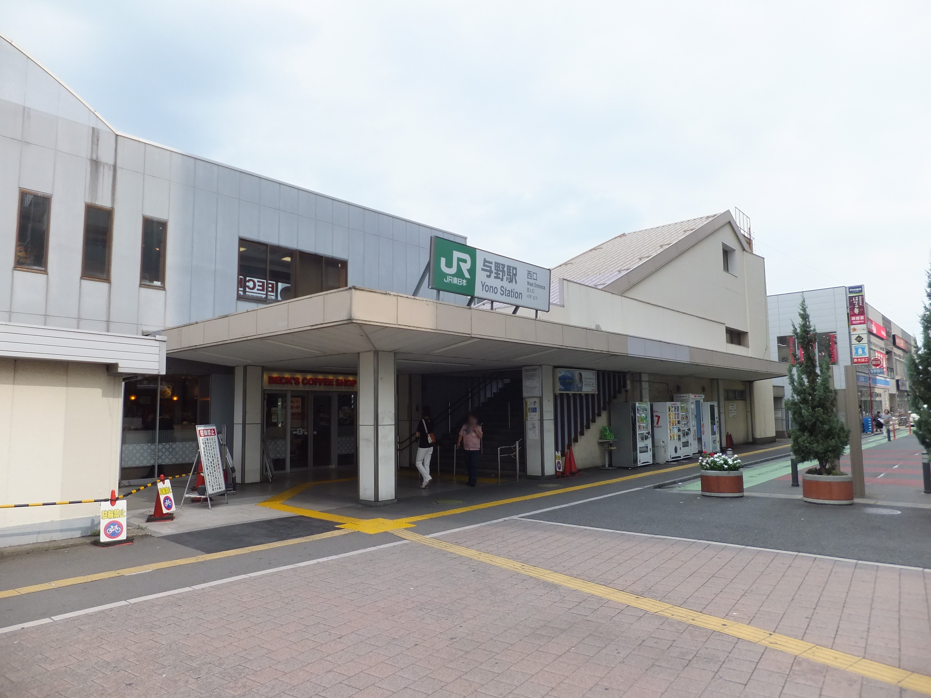 京浜東北線・与野駅西口（さいたま市浦和区）